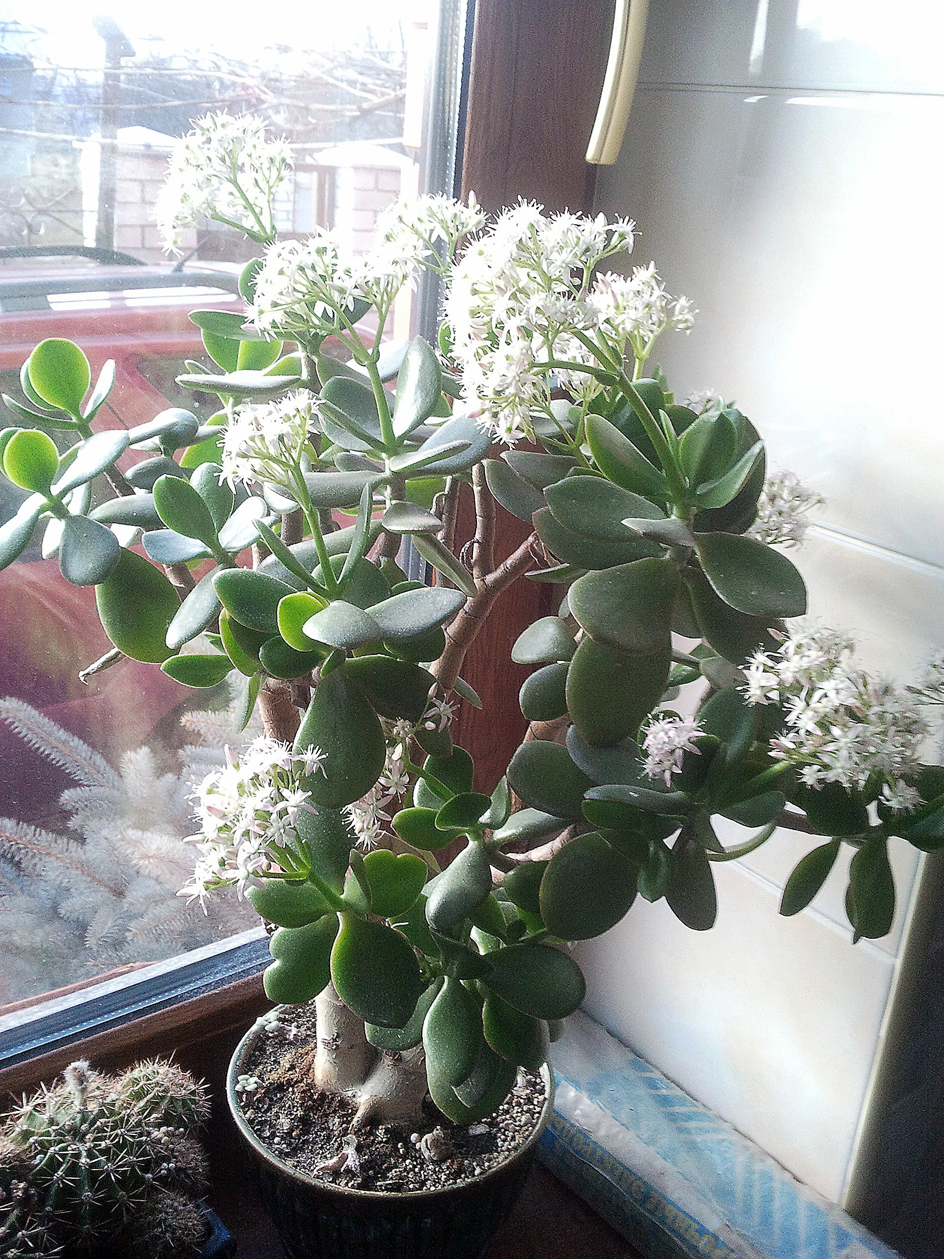 Толстянка в период цветения.